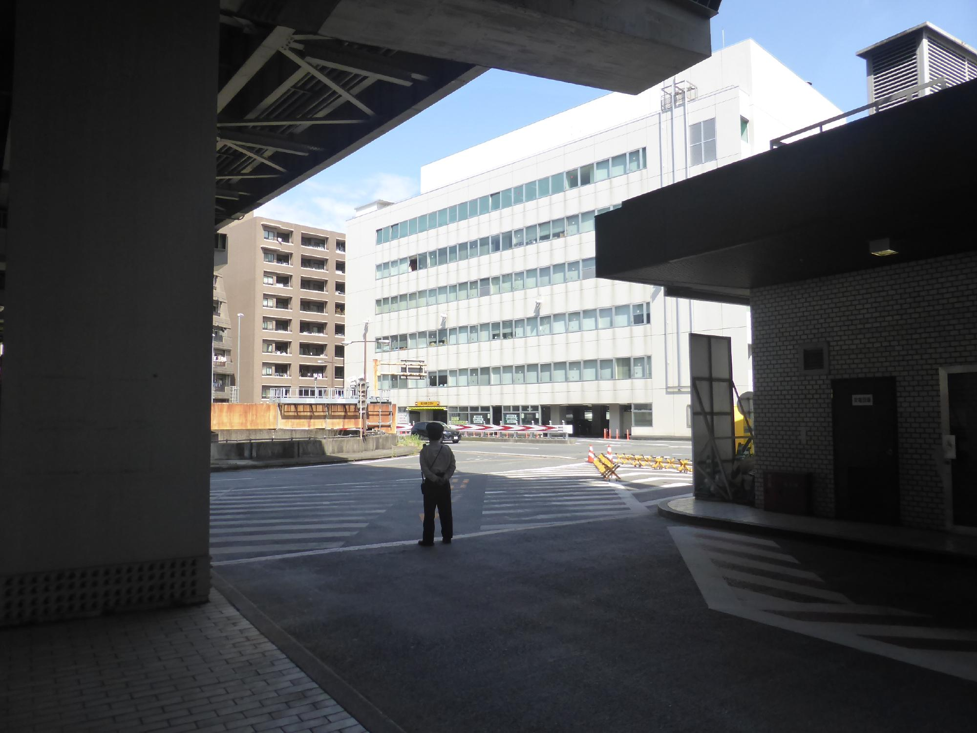 TCAT側から箱崎PA全景